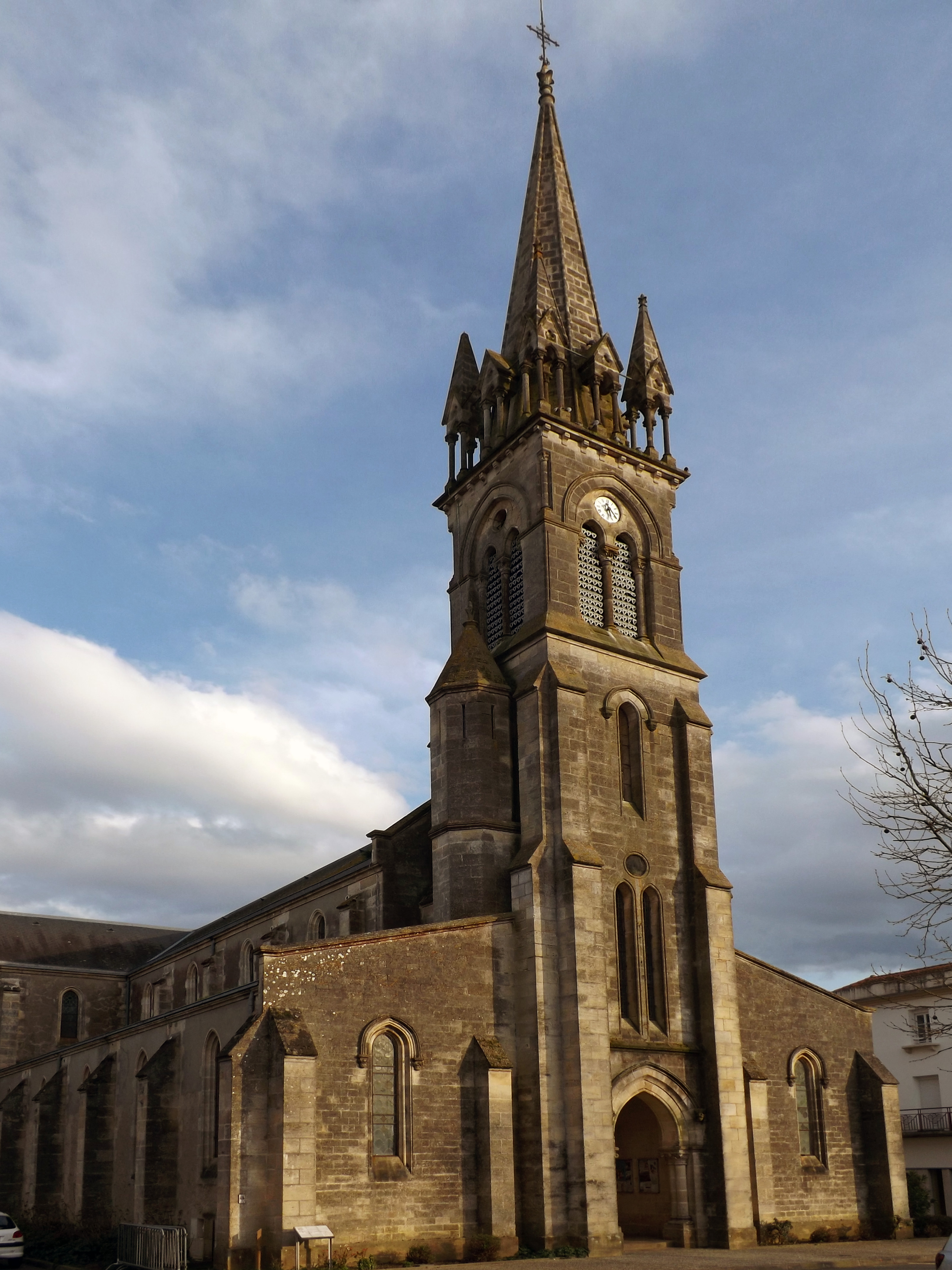 Glèisa de sent Laurenç de Mugron, Shalòssa, Gasconha